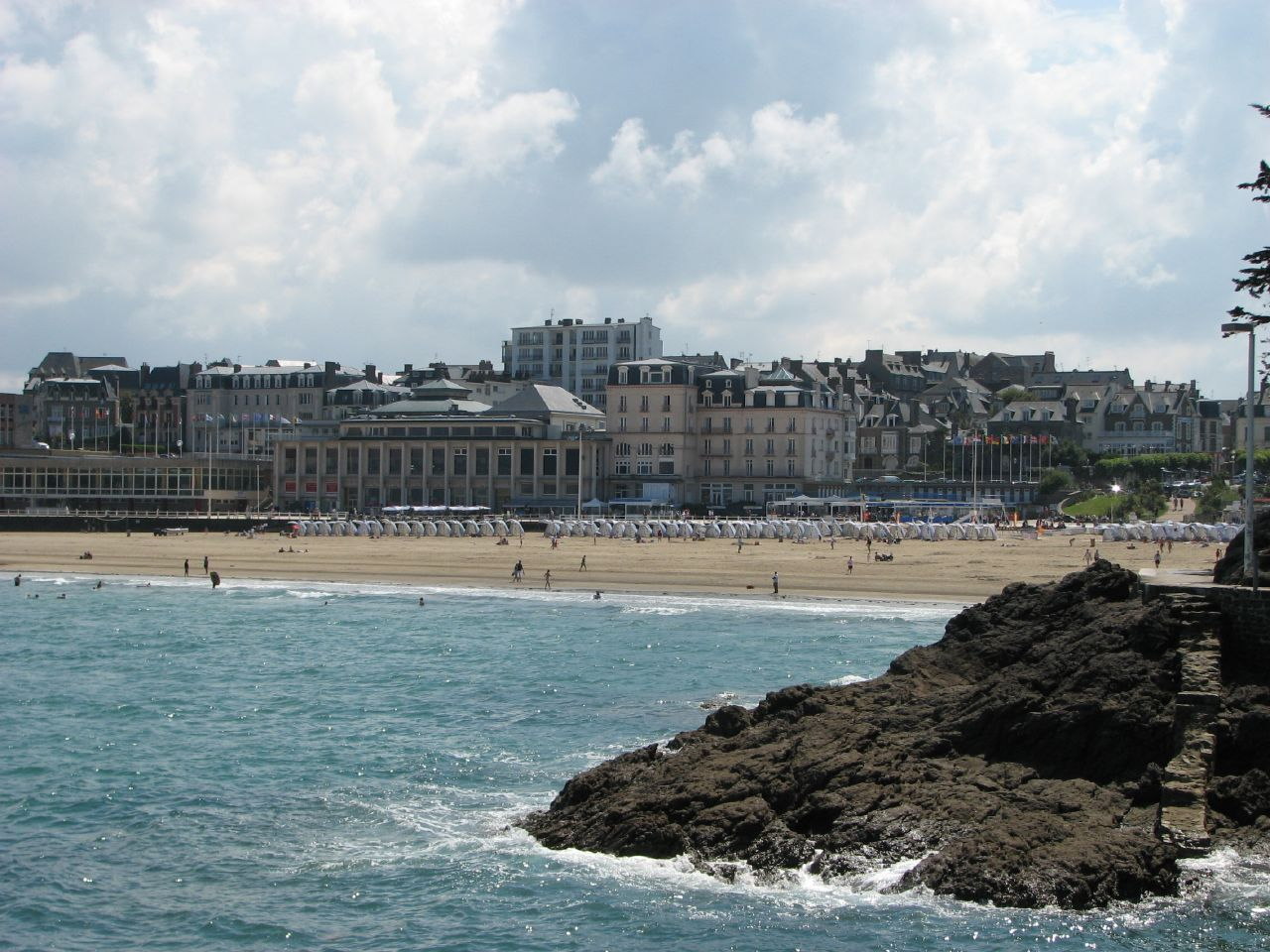 Plage de l'Ecluse-Dinard.